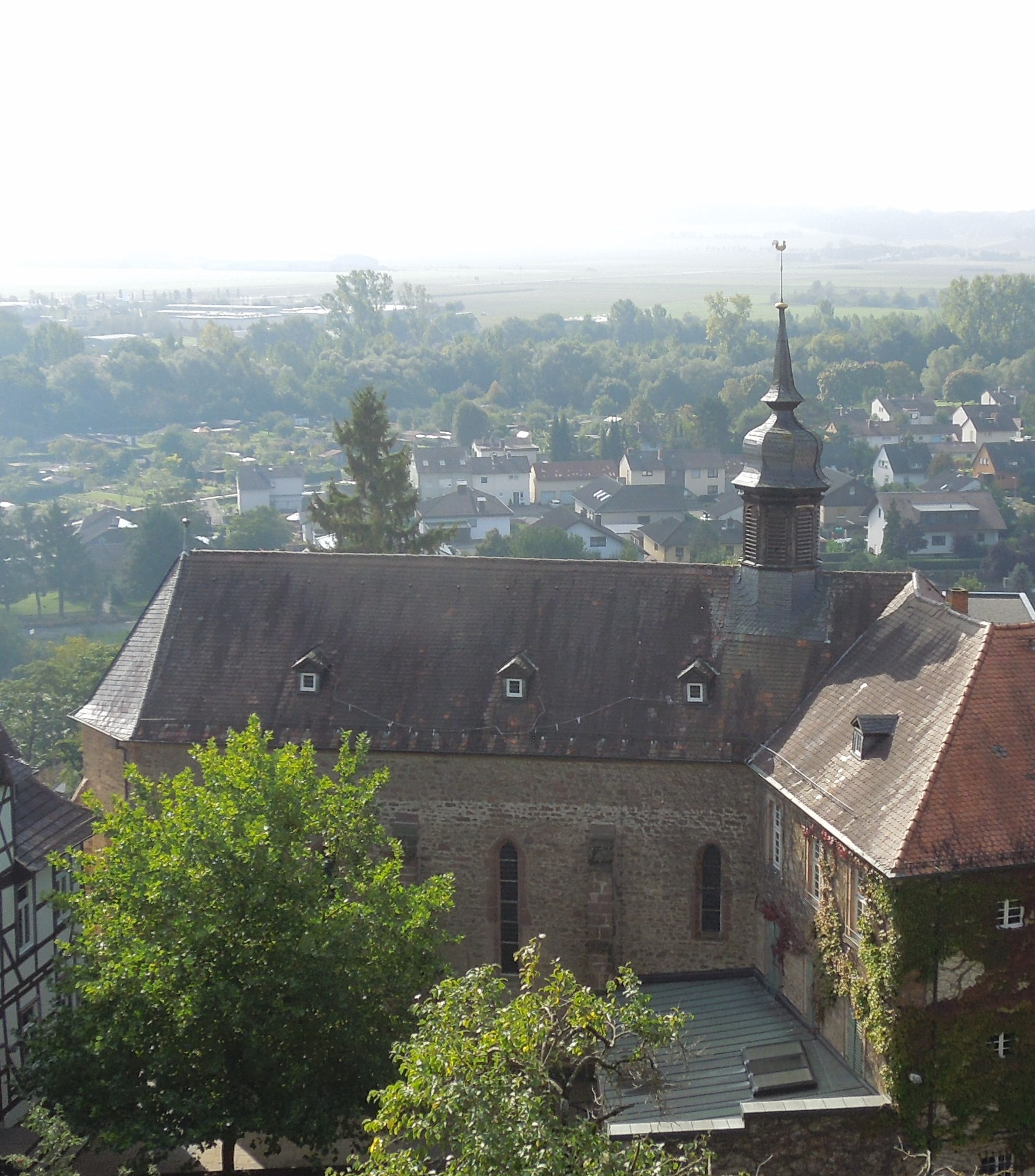 Fritzlar: Klosterkirche der Ursulinen